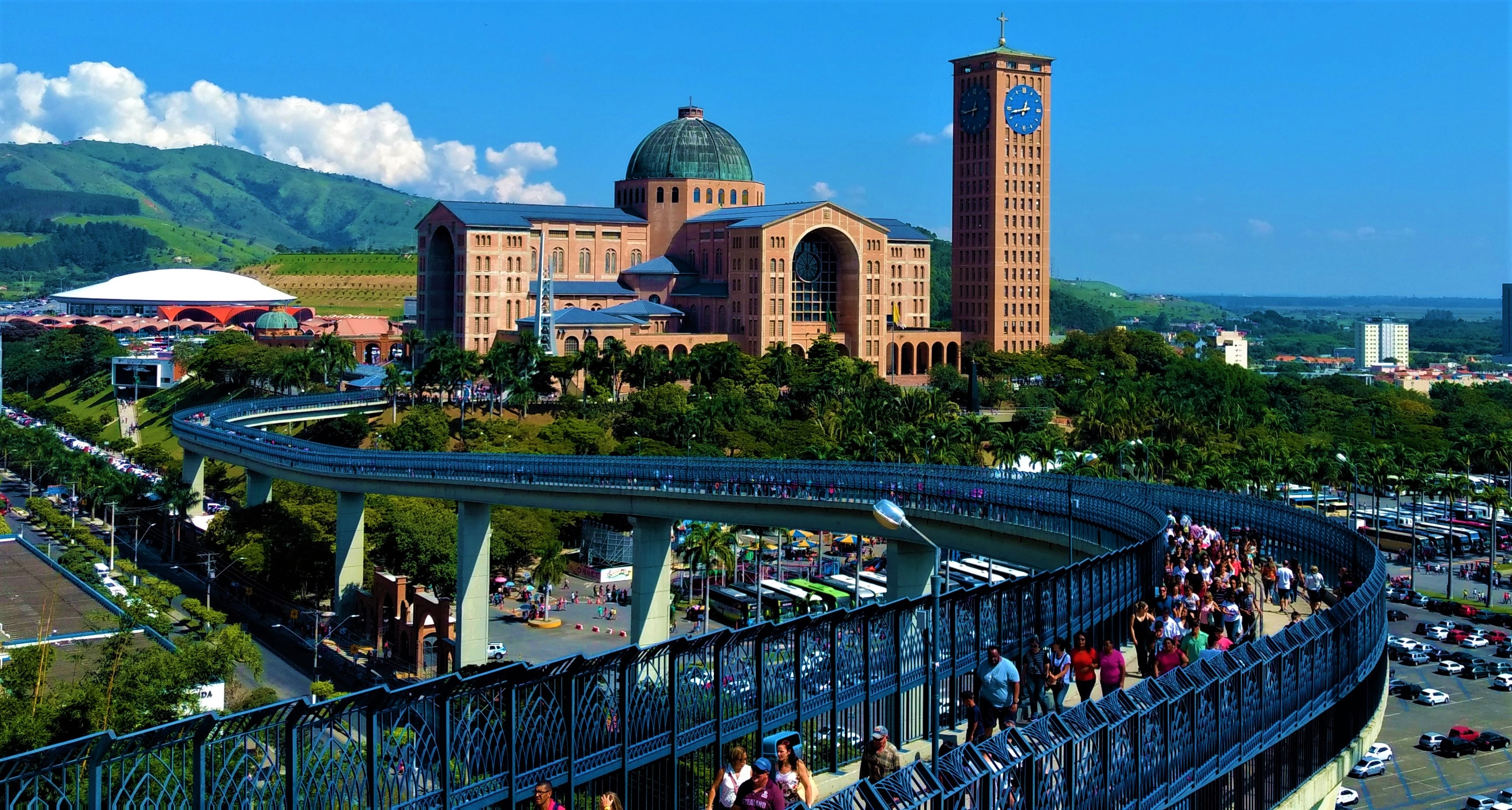 Vista da passarela e da Basílica. Cultural property Basilica of the National Shrine of Our Lady of Aparecida, Aparecida, São Paulo, Brazil Q2886950, iPatrimônio ID: aparecida-basilica-de-nossa-senhora-aparecida